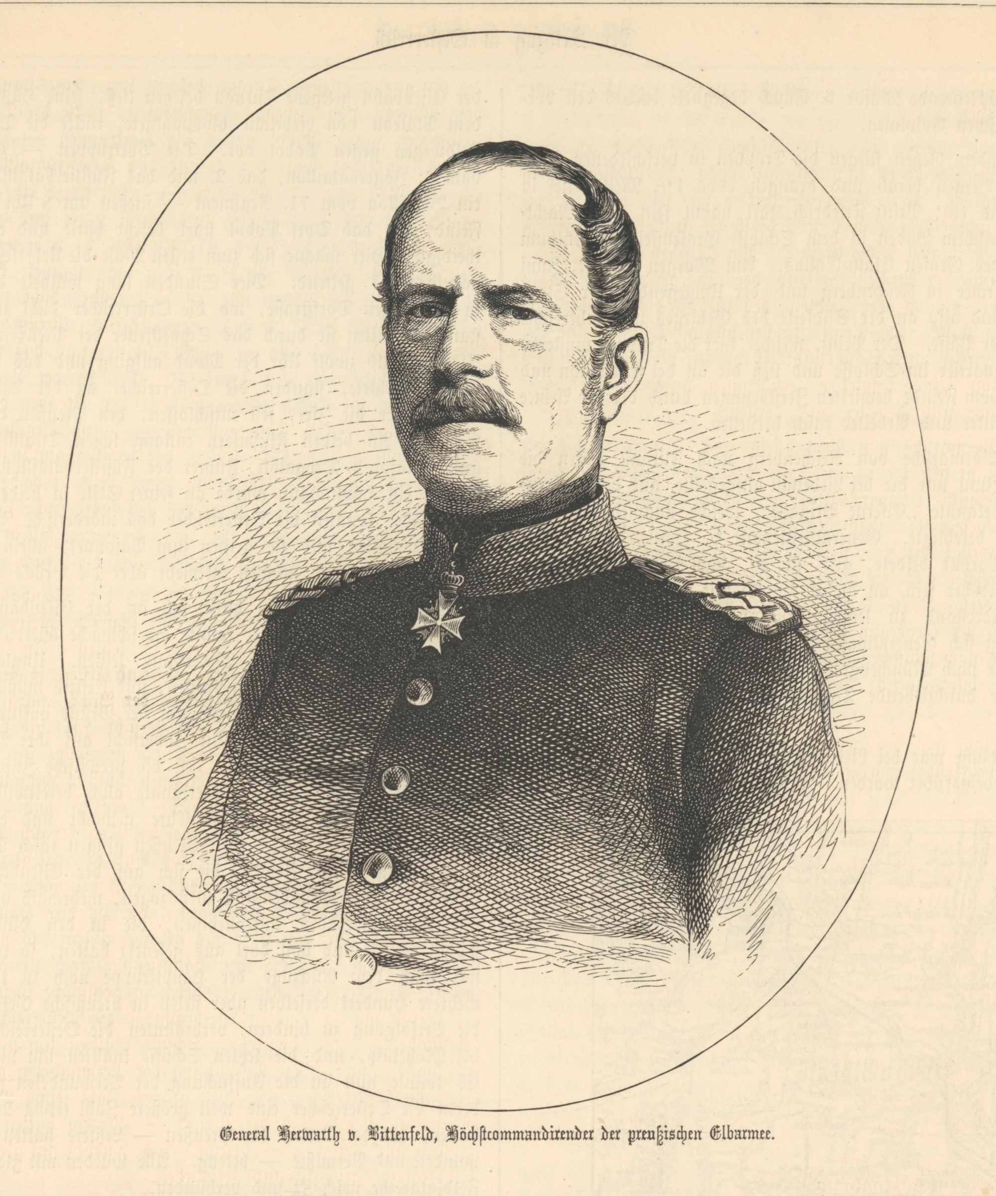 Eberhard Herwarth von Bittenfeld (1796-1884), ca. 1866